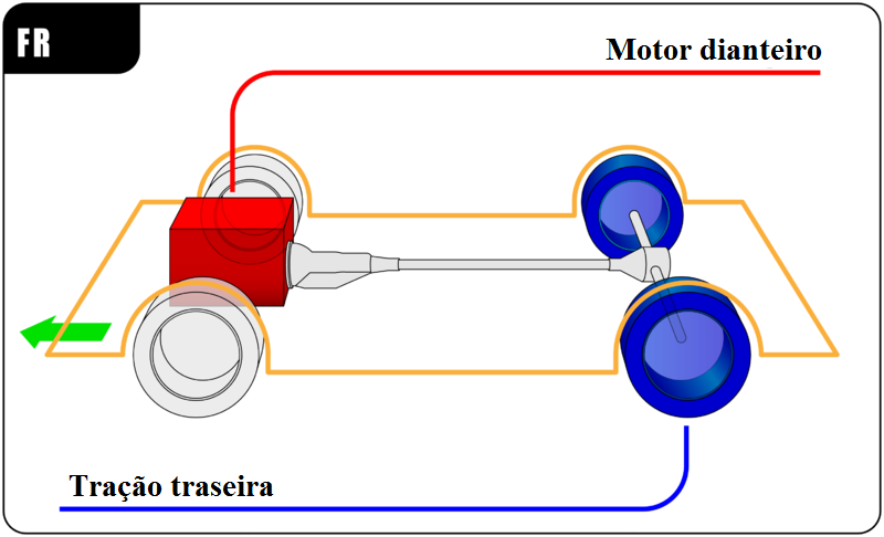 Vehicle engine and drive wheel placement diagrams.